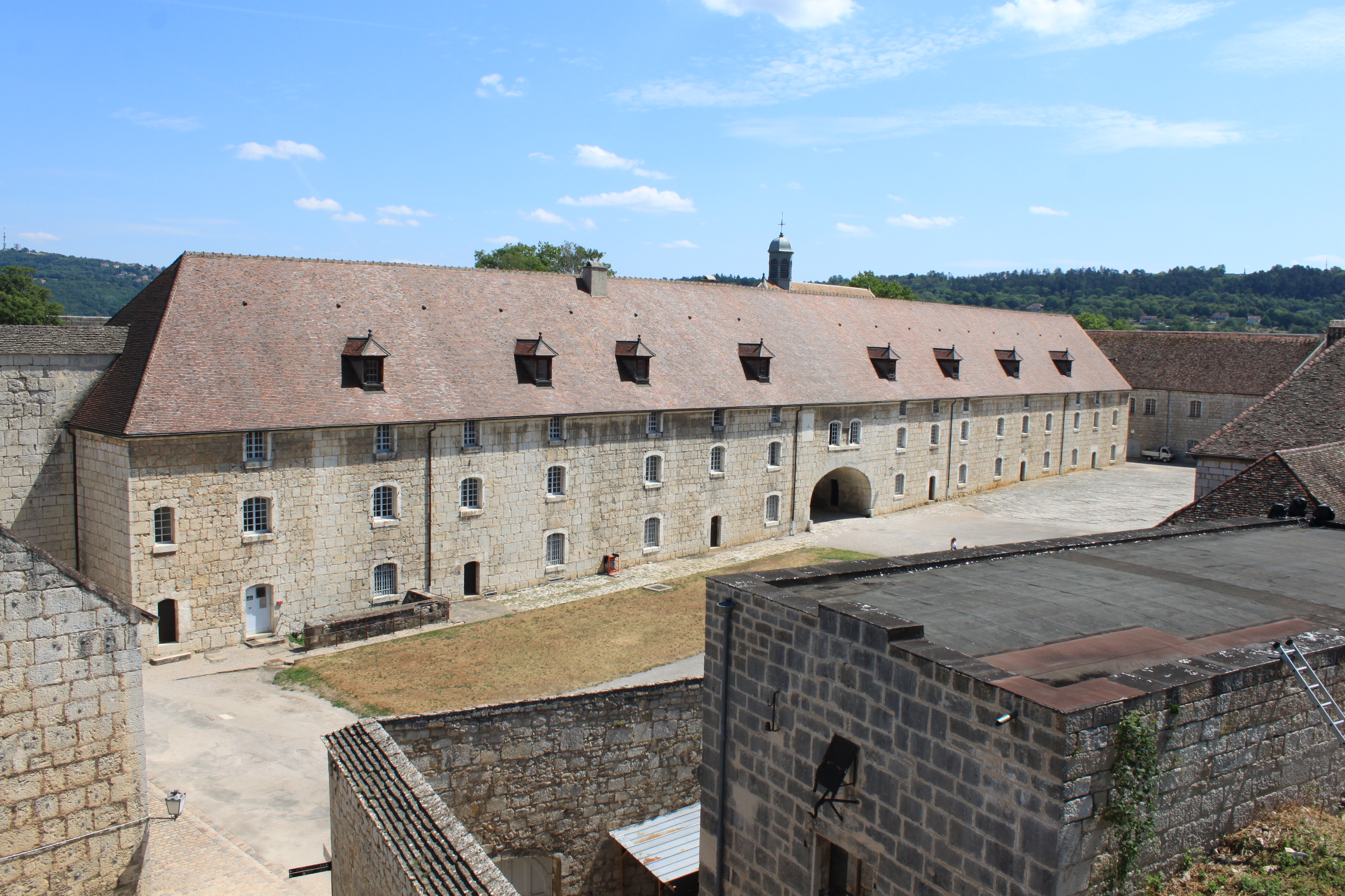 Citadelle de Besançon, Besançon, Bourgogne-Franche-Comté, France